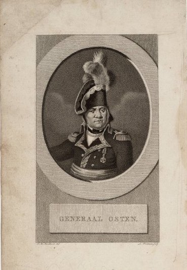 Portrait de Pierre-Jacques Osten (1759-1814)